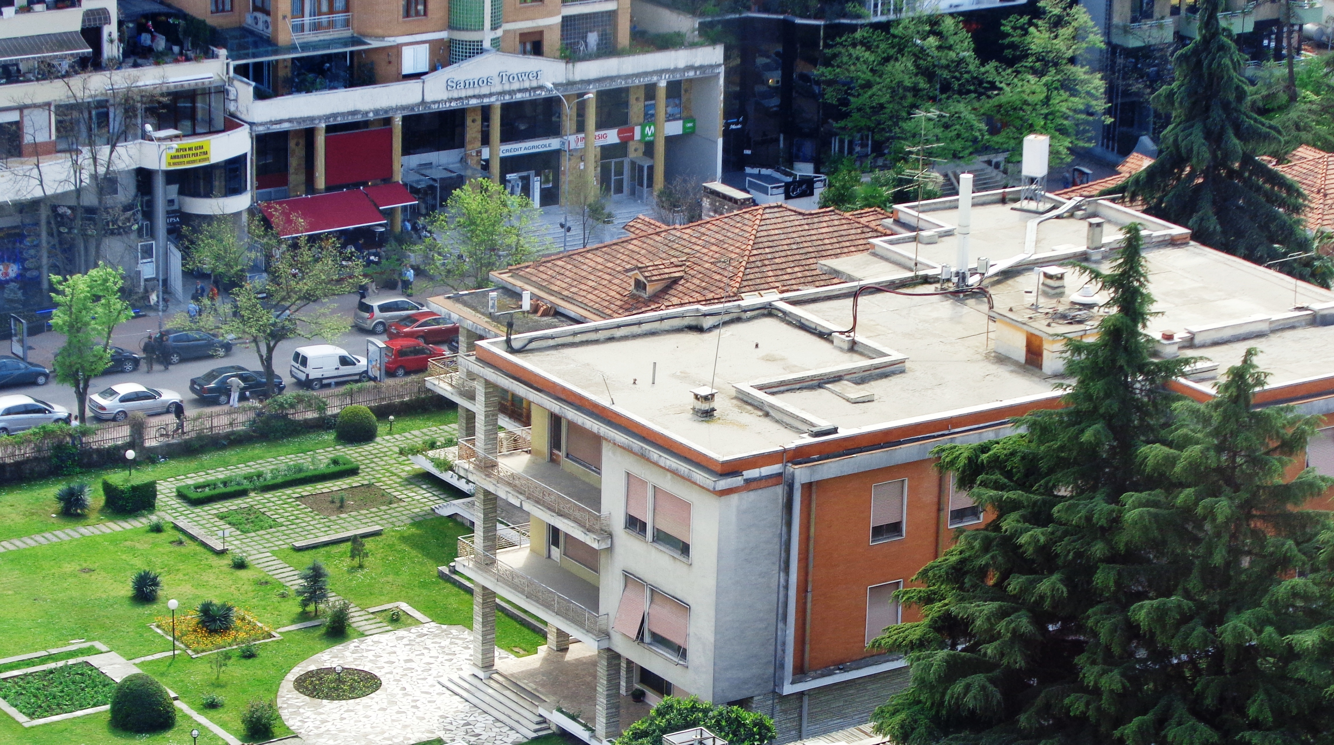 Shtëpia e Enver Hoxhës në Tiranë